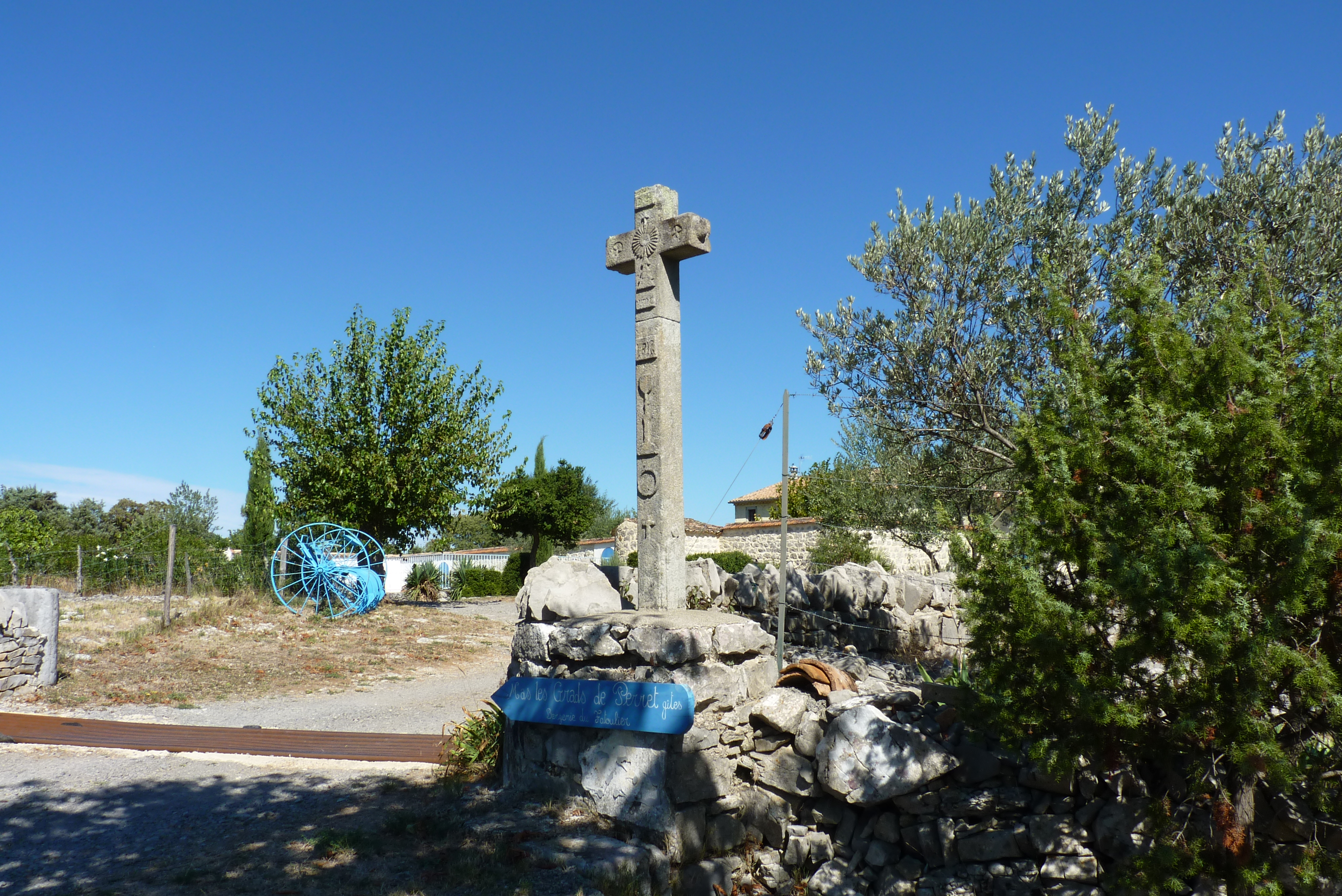 Joyeuse dans le département française de l'Ardèche. Plateau des Grads-Mas Gourdon-Croix de Mission 1816.